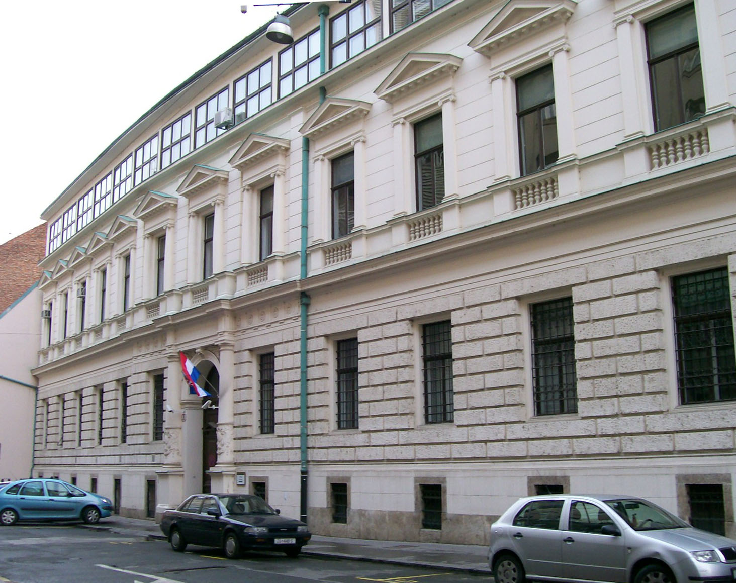 Trgovački sud u Zagrebu